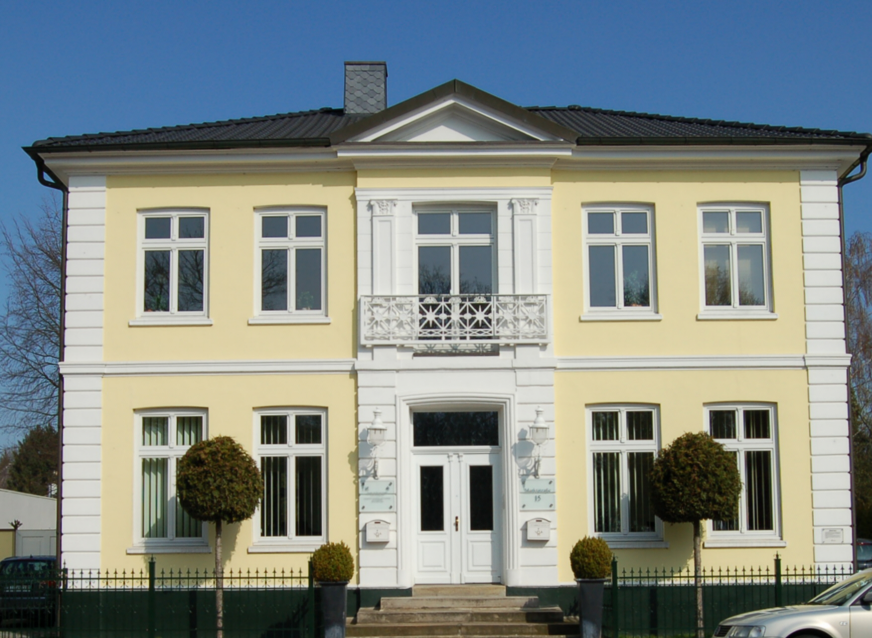 Das Bleeker-Haus in Uetersen, später Wohnhaus von Hans Detlef Stäcker (1923-2003). Es ist ein Denkmalgeschütztes Gebäude im Kreis Pinneberg.